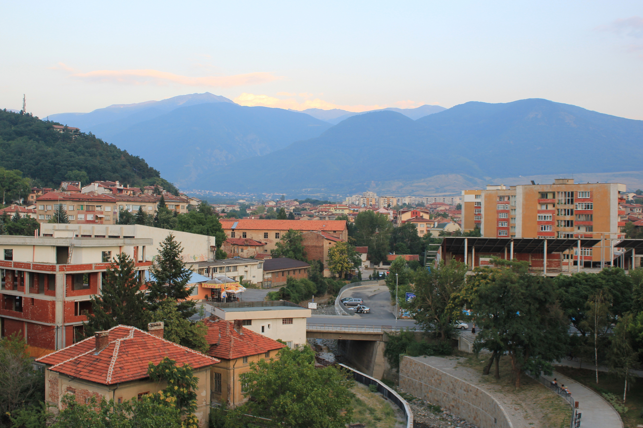 Die bulgarische Stadt Dupnitsa mit dem Rila-Gebirge im Hintergrund.Hornjoserbsce: Bołharske město Dupnica z Rilowej horinu w pozadku.